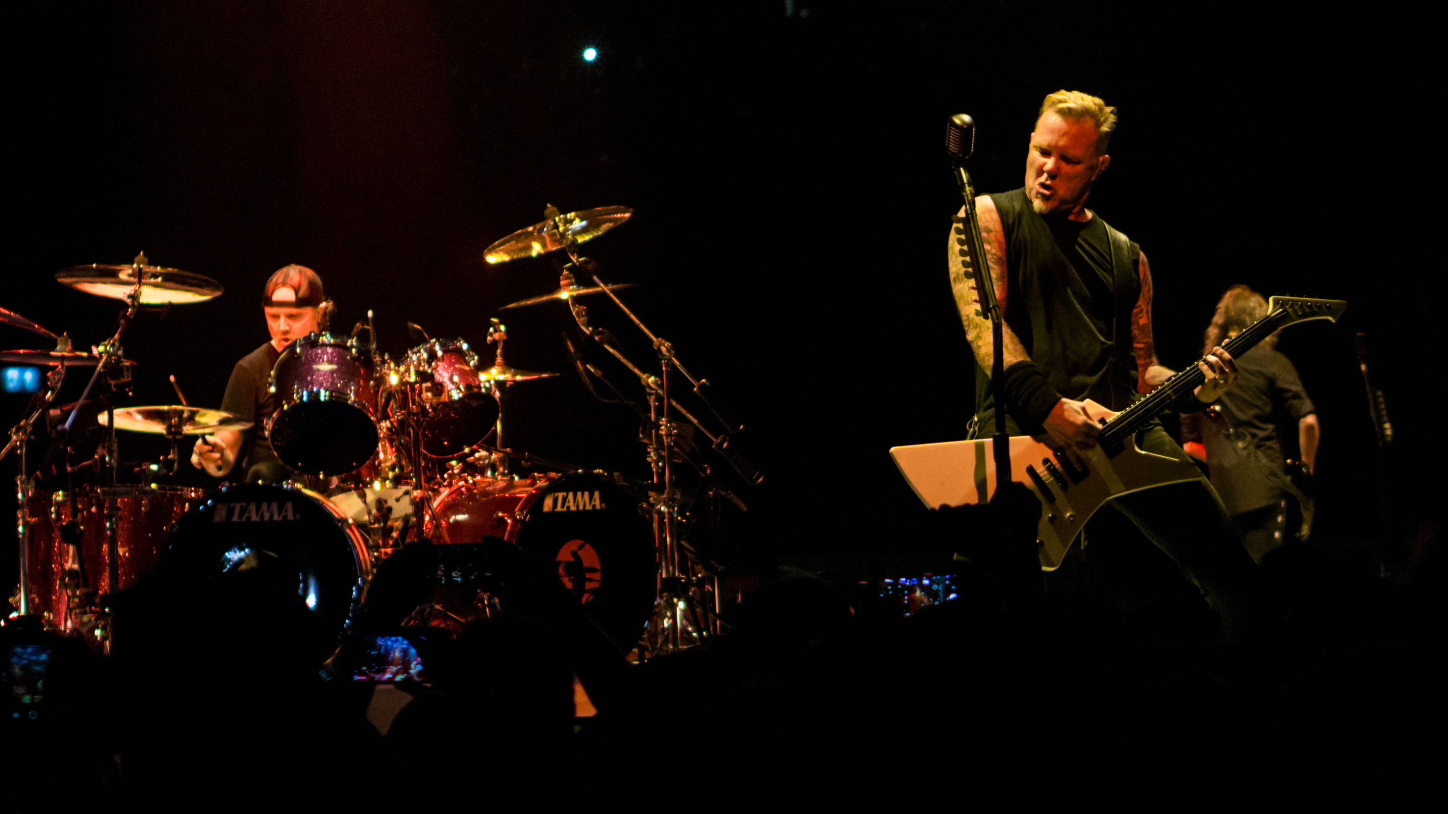 MetallicaO2241017-34